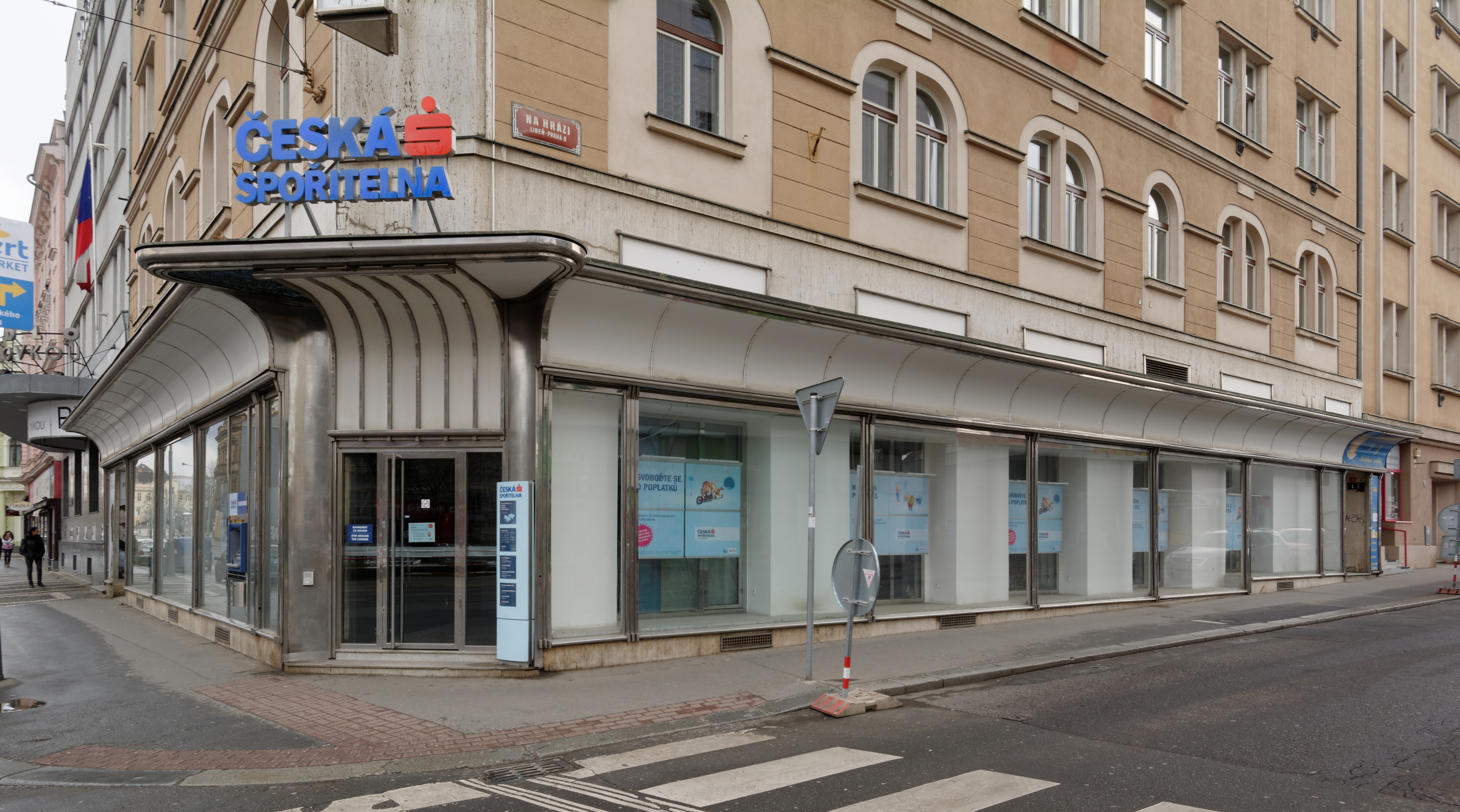 Max Gerstl: výkladce obchodu, třicátá léta 20. století. Dům Na hrázi 121/1, 180 00 Praha 8 - Libeň.